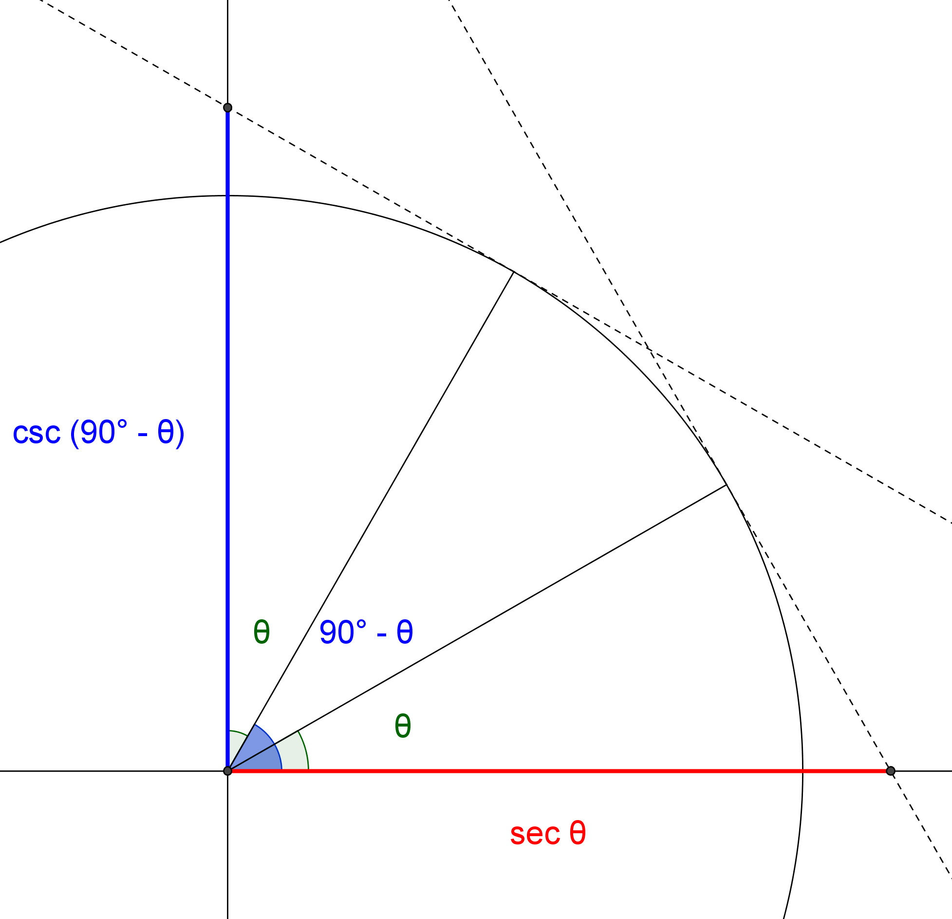 Descreve a relação de simetria entre a secante de um ângulo e seu complementar